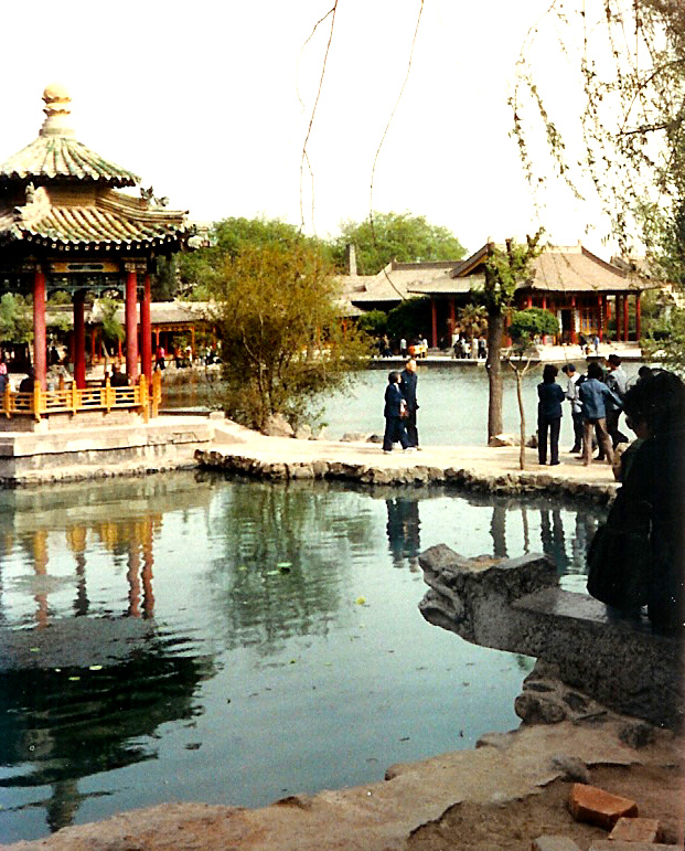 Park vu Peking mam Summerpalais